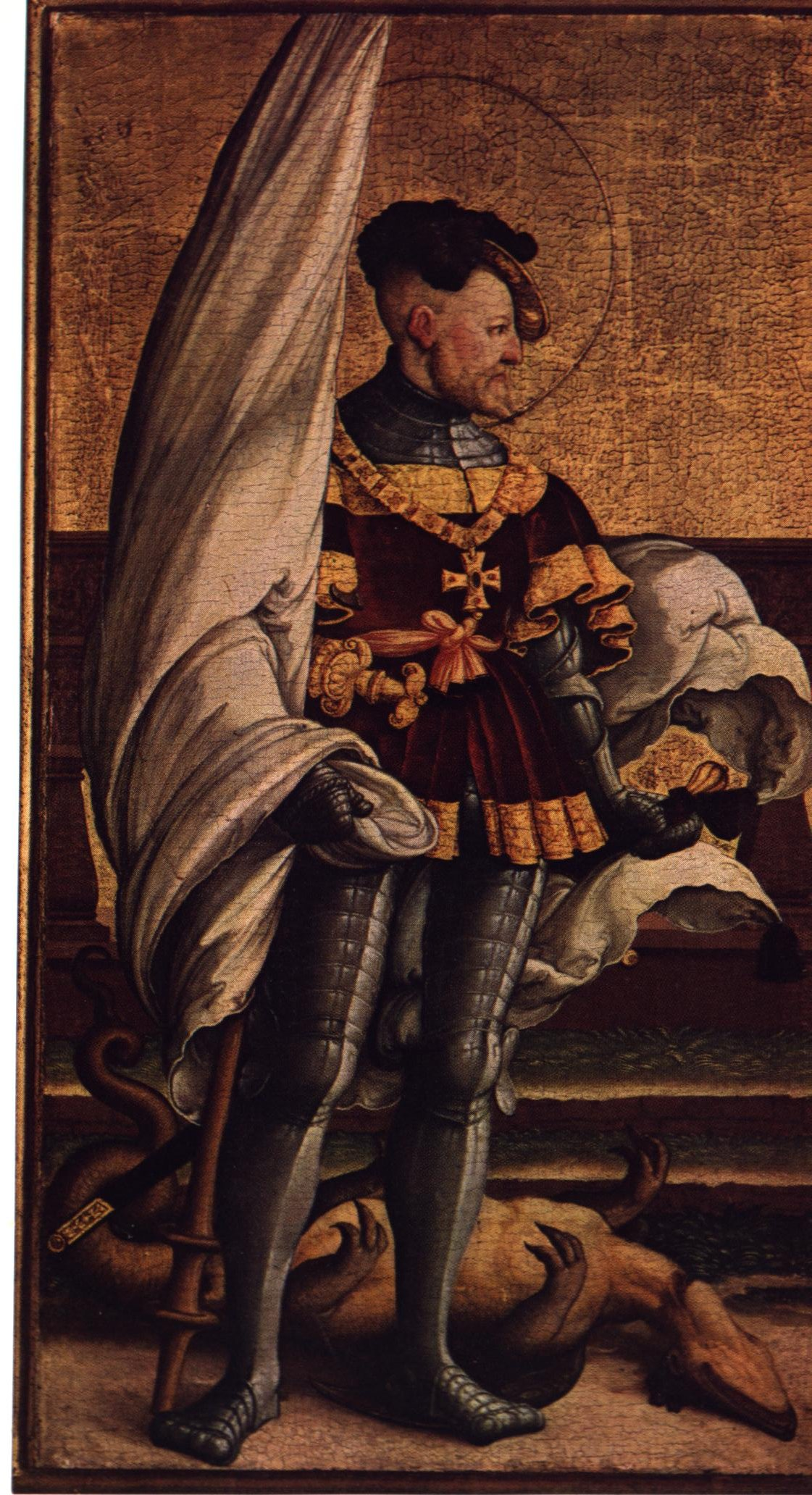 Falkensteiner Rentabel (St. Annenaltar aus Falkenstein), Drehflügel, links außen, Porträt eines Grafen von Zimmern